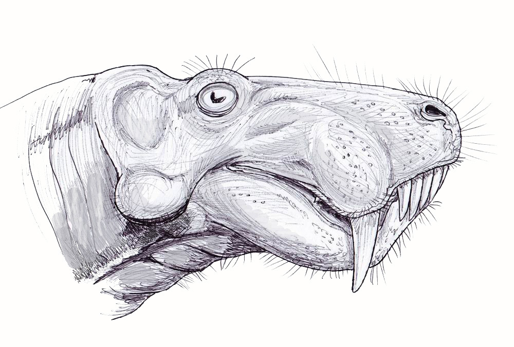 Rubigea atrox